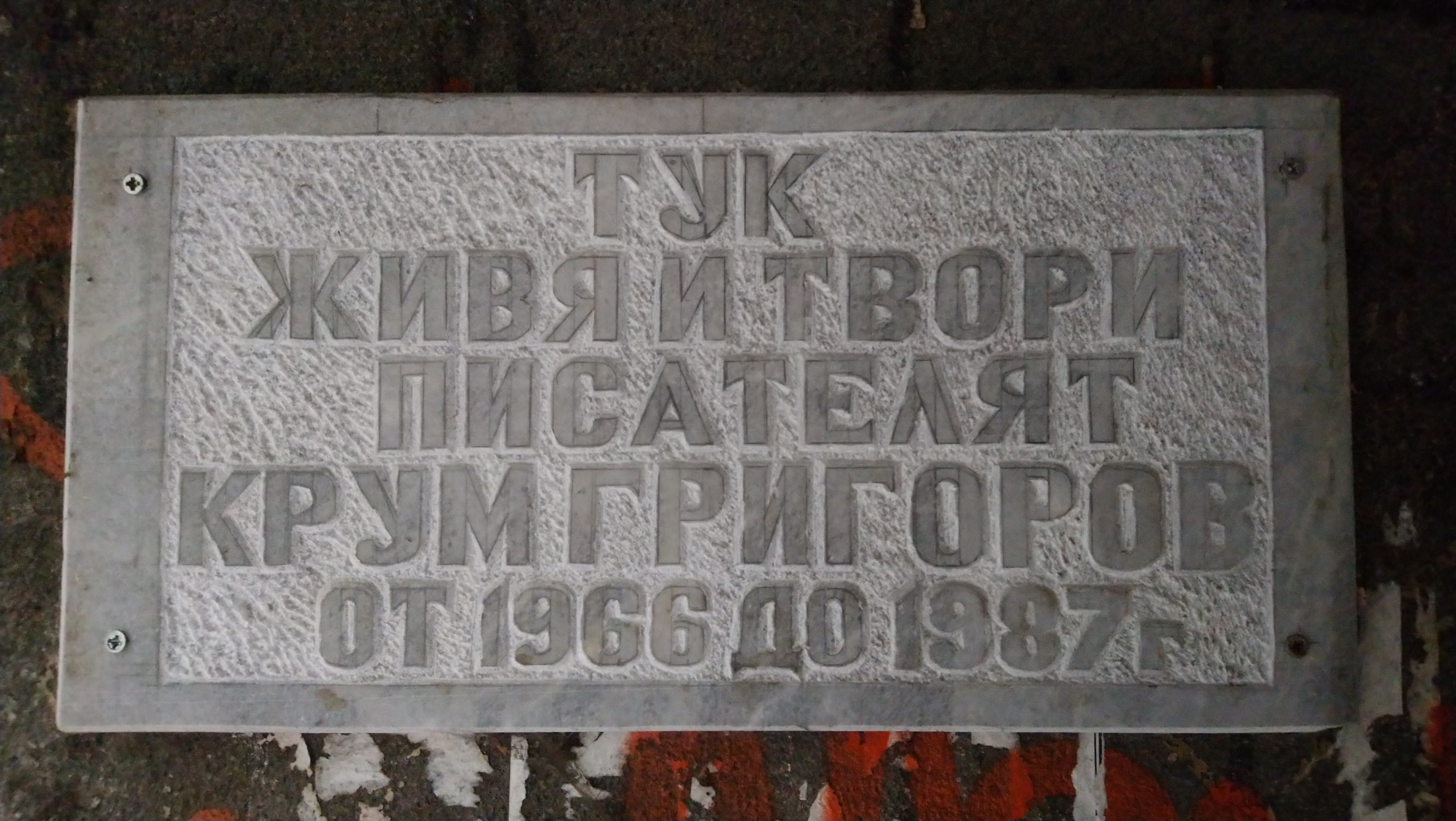 Паметна плоча на писателя Крум Григоров, ул. Гургулят 20, София